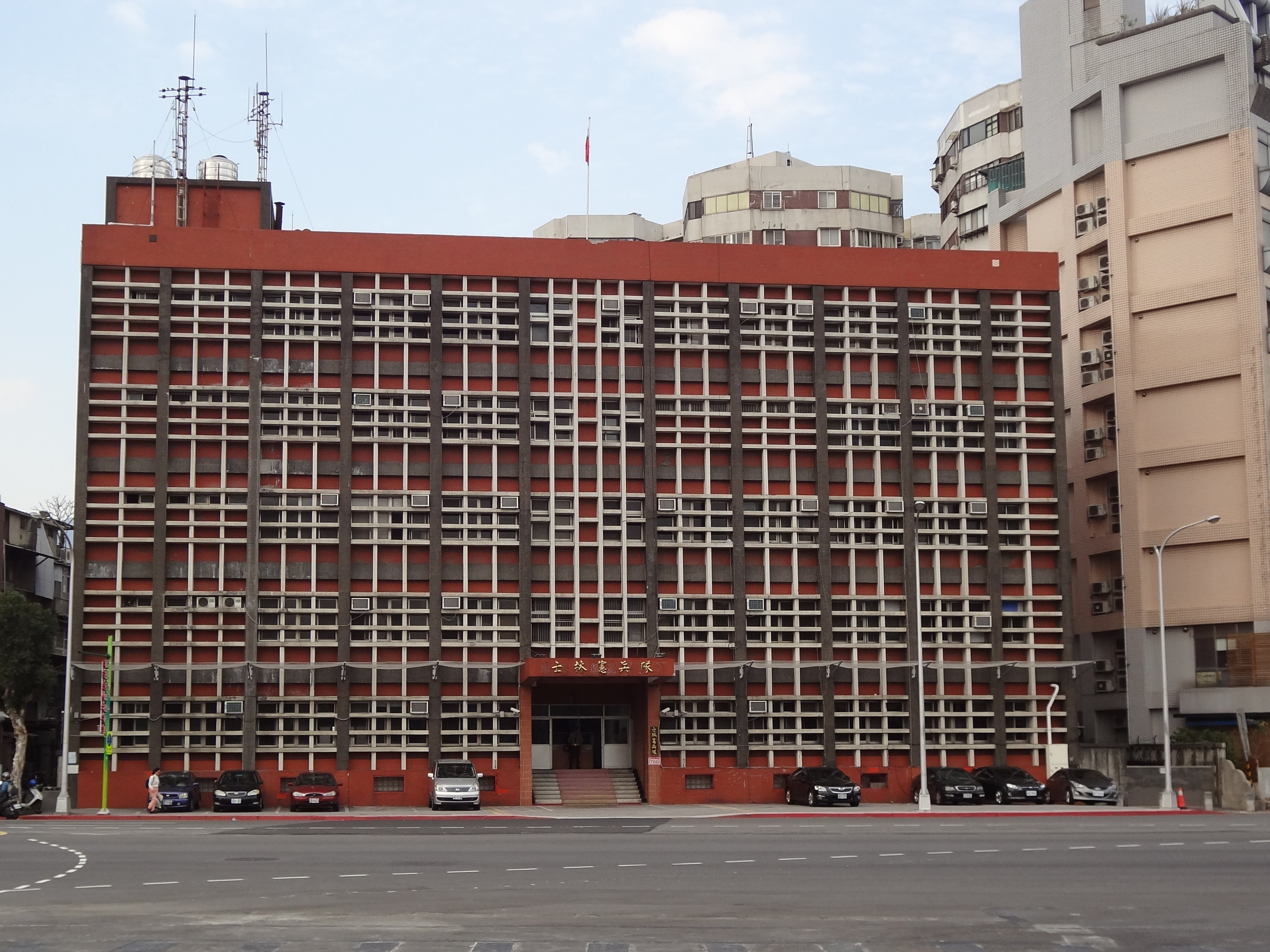 士林憲兵隊，地址：臺北市士林區文林路706號。